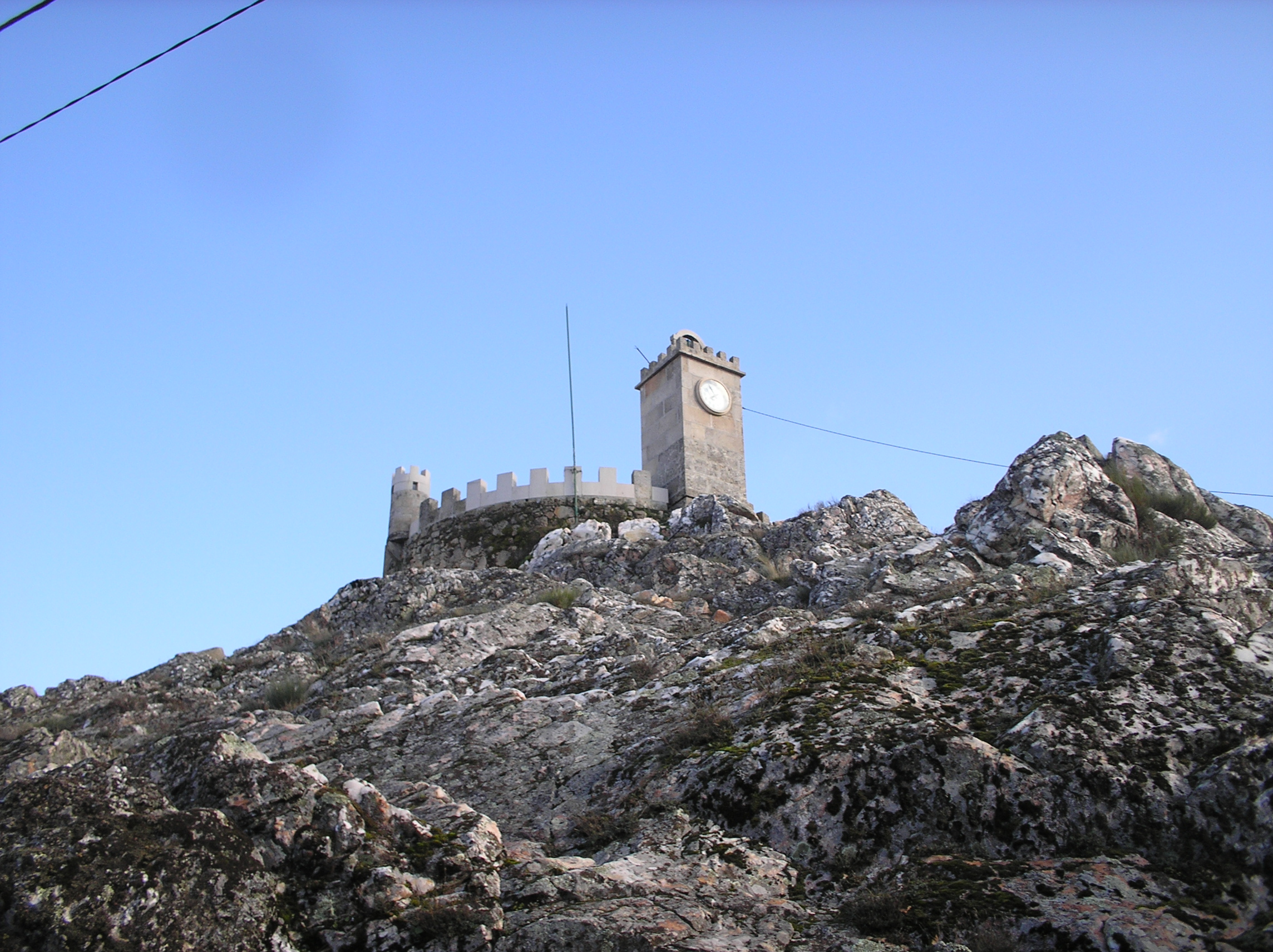 Folgosinho